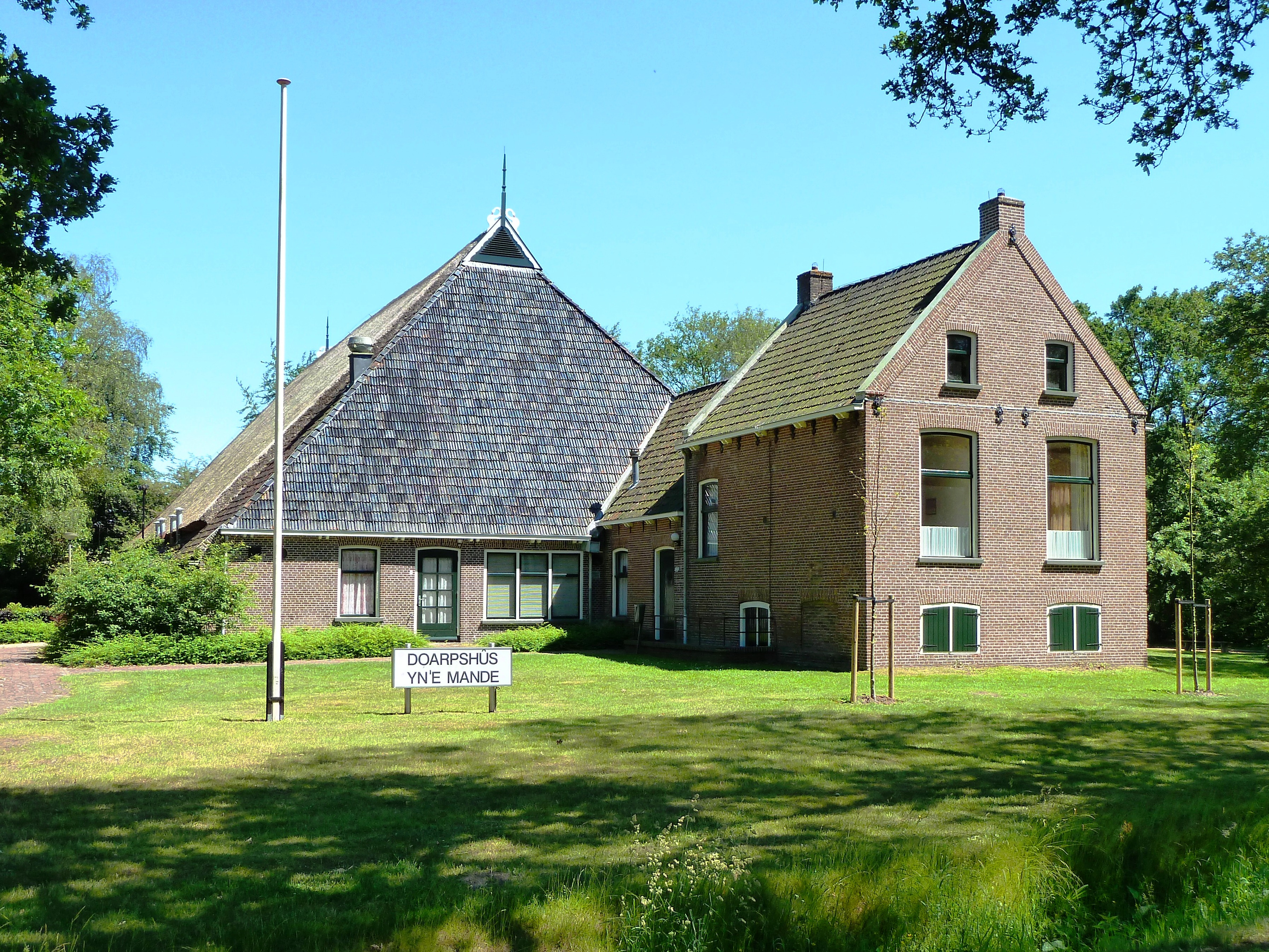 Dorpshuis Yn 'e Mande in het Friese dorp Tietjerk (Tytsjerk)